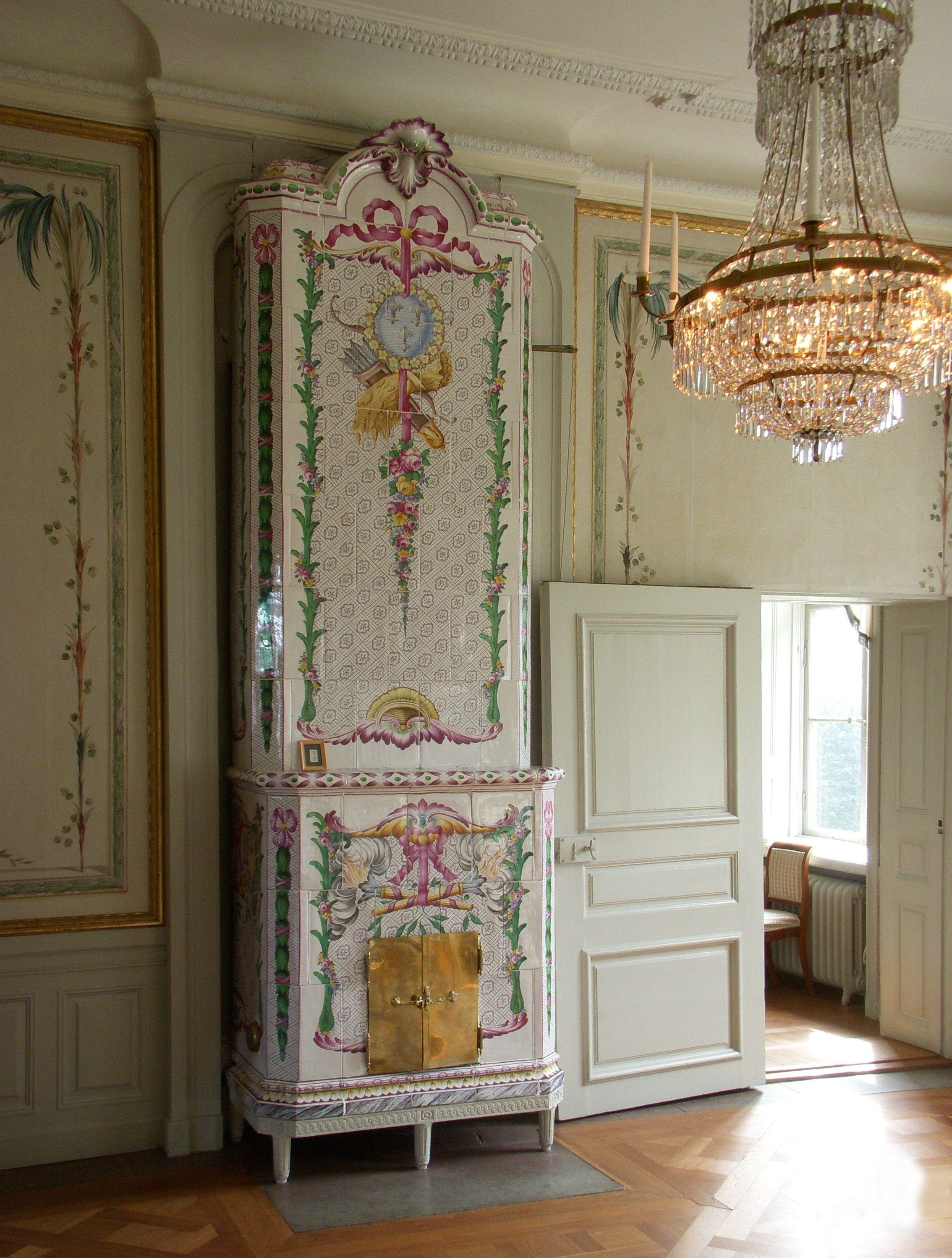 Sturehov slott interiör, vån 1 tr, "Liljencrantz' kakelugn"